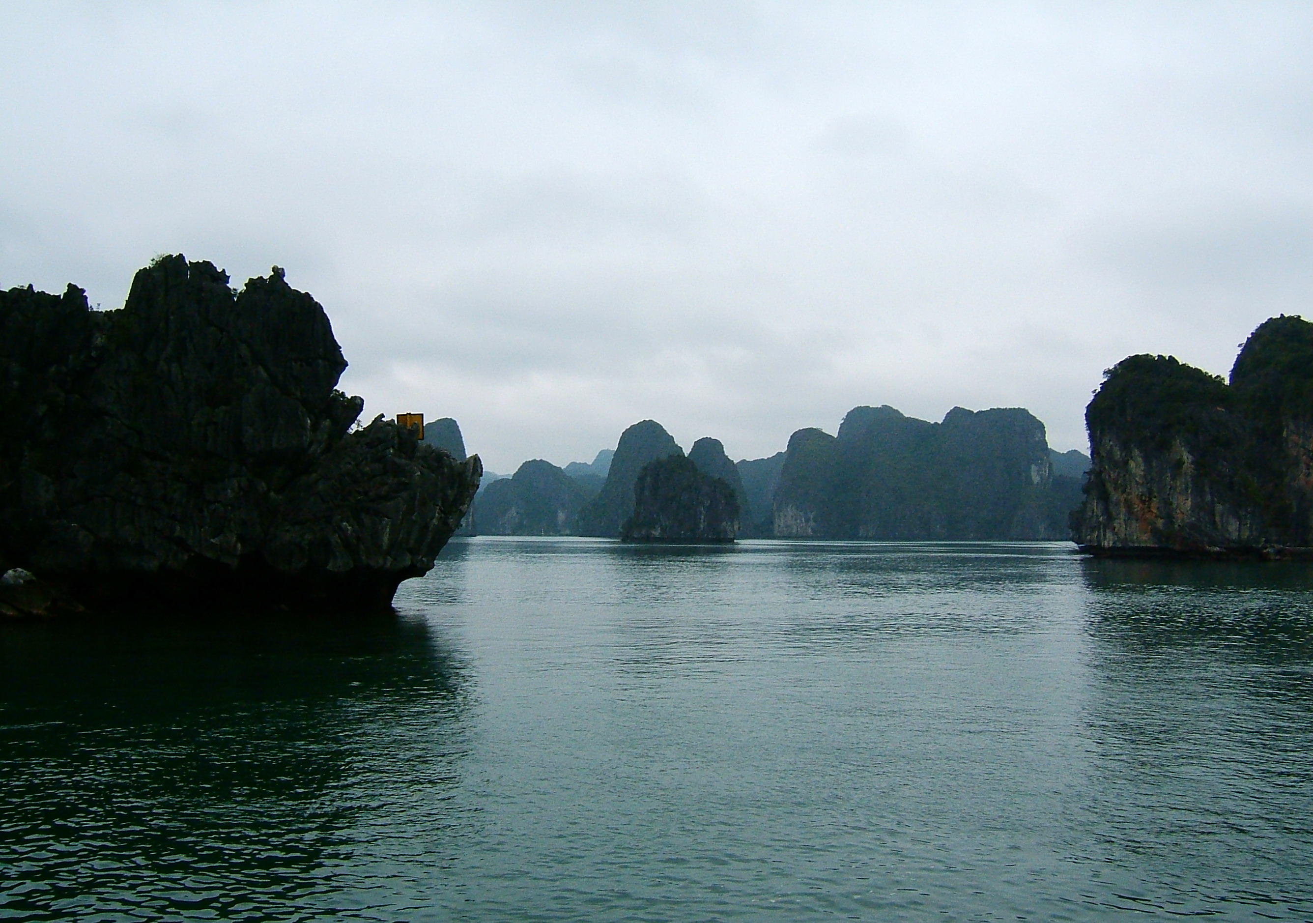 Cat Ba